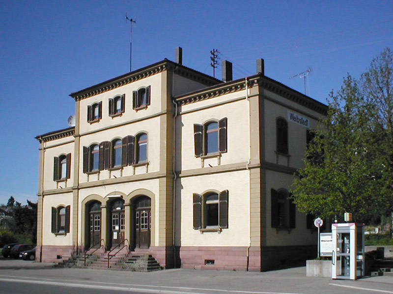 Bahnhof von Waibstadt